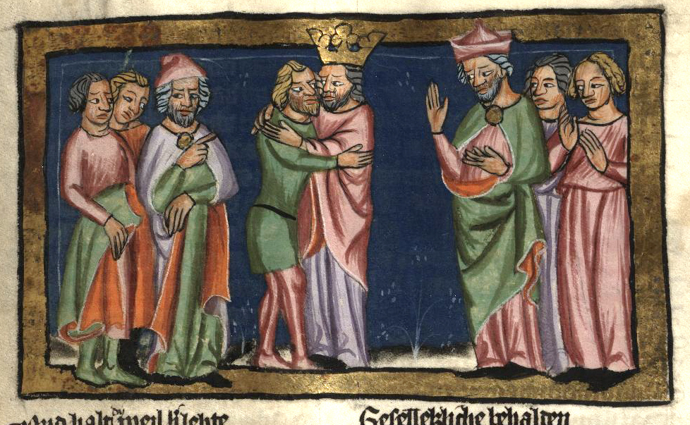 Rudolf von Ems: Weltchronik. Böhmen (Prag), 3. Viertel 14. Jahrhundert. Hochschul- und Landesbibliothek Fulda, Aa 88. Bildbeschreibung nach Martin Roland. Miniatur 172 280r David und Abschalom versöhnen sich